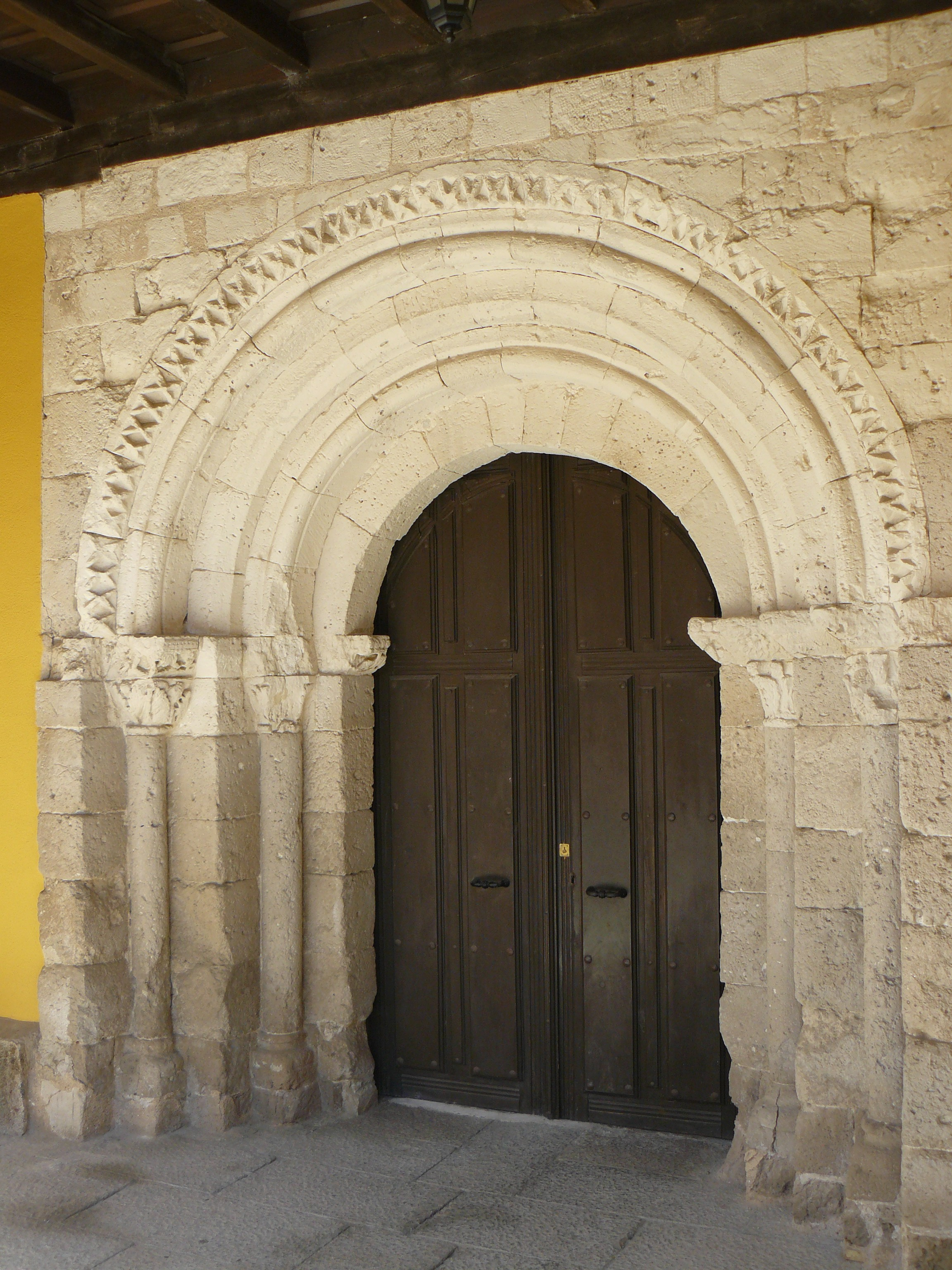 Villafuerte de Esgueva, Burgos.